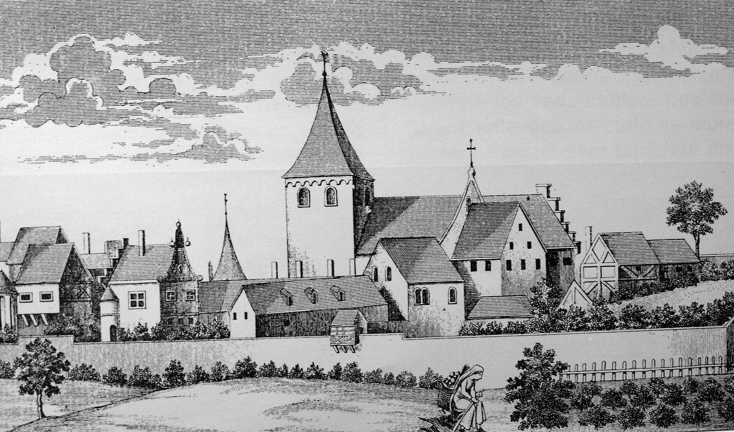 Abbaye de Saint-Gilles, Liège, 1584, dessin tiré d'un manuscrit de Langius